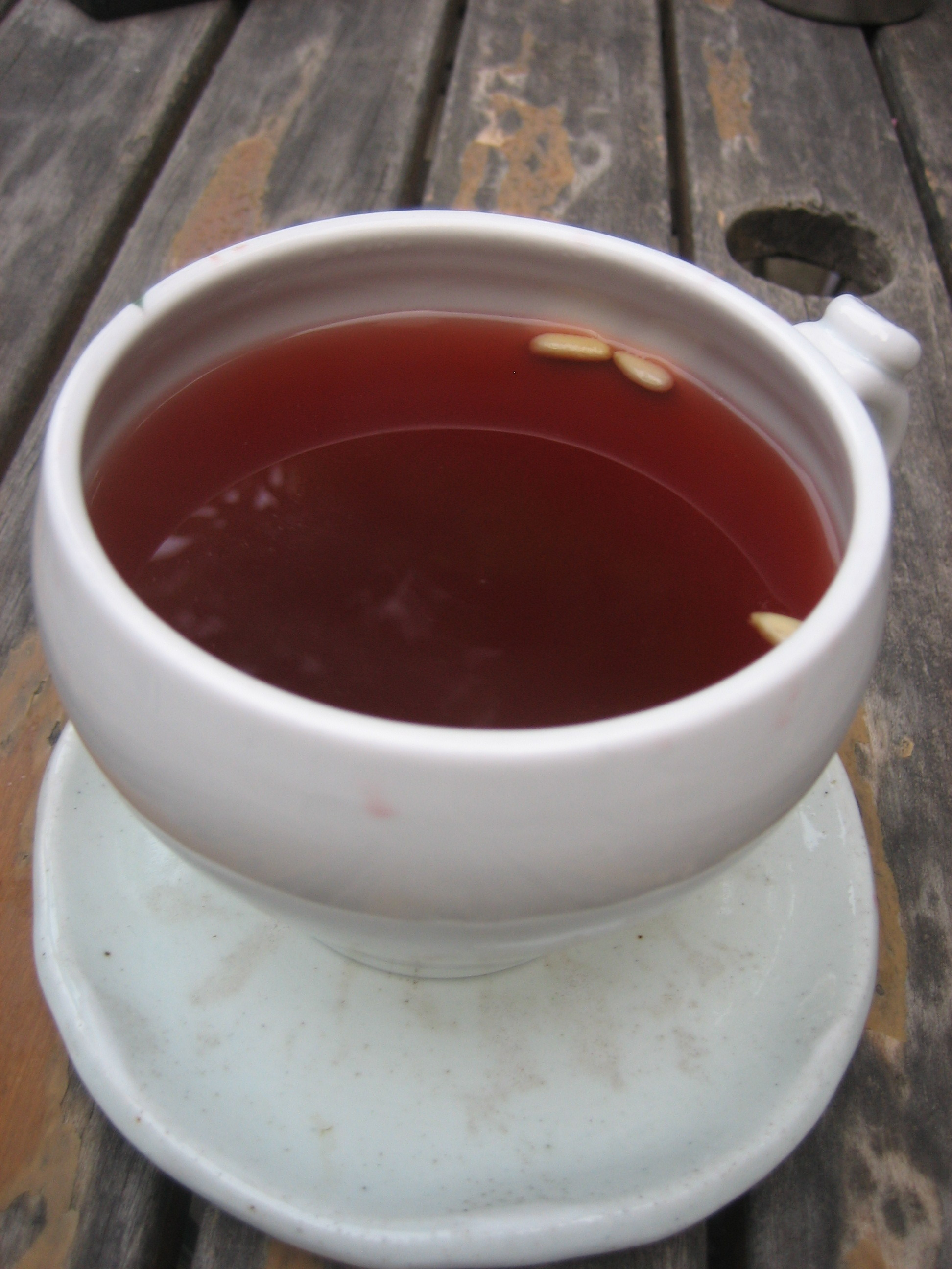 Sujeonggwa, Korean fruit punch